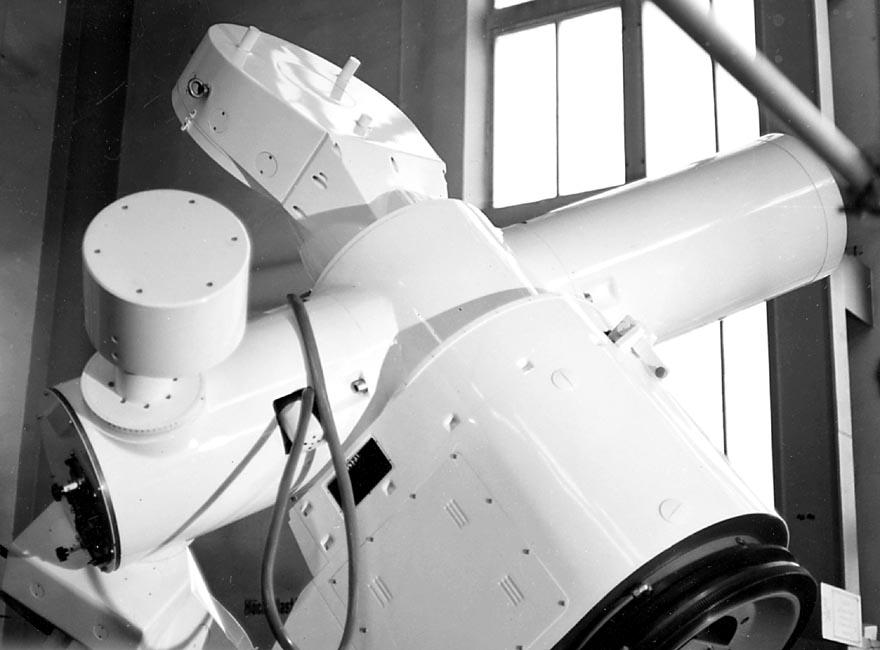 Beschreibung: Jensch-Coelostat Aufnahmedatum: August 1979 Fotograf: ArtMechanic